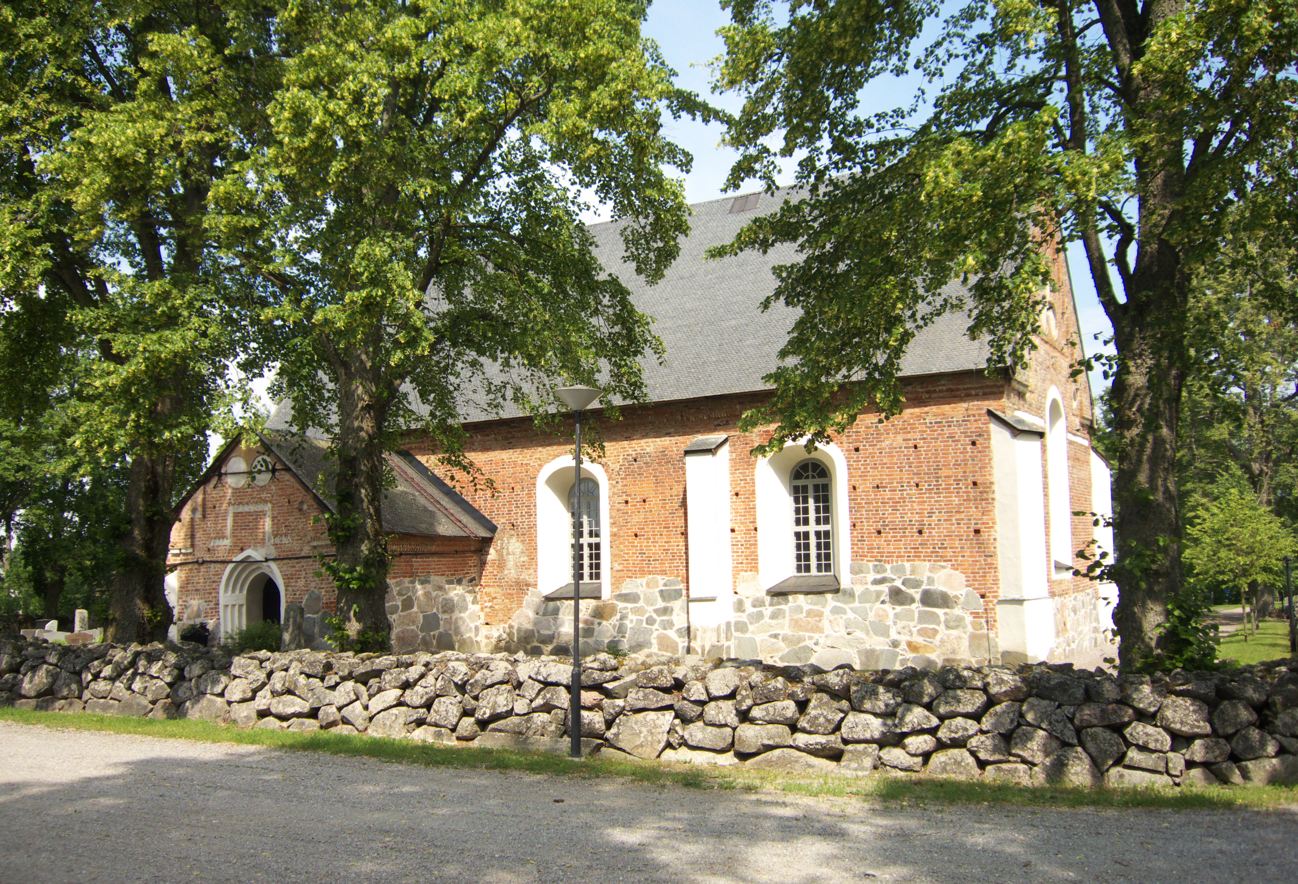 Nysätra kyrka, Uppland